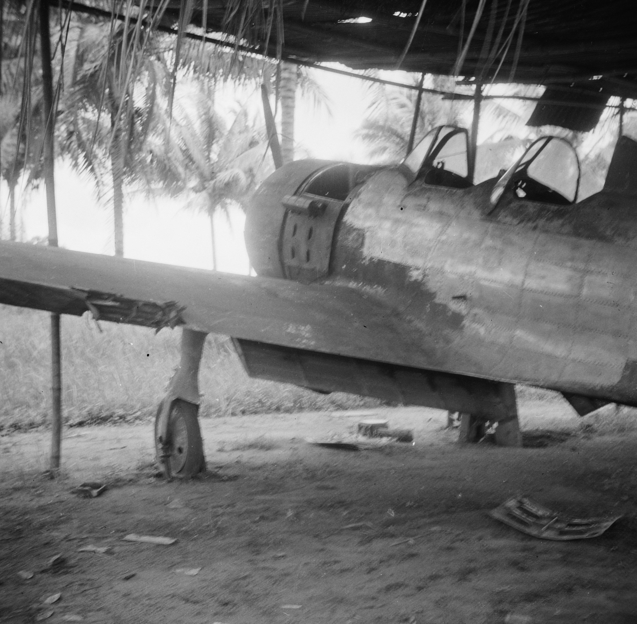 Collectie / Archief : Fotocollectie Dienst voor Legercontacten Indonesië Reportage / Serie : [DLC] Vliegveld Teloekbetoeng Beschrijving : Het in de omgeving van Telok Betoeng (Sumatra) gelegen vliegveld, werd voor de inval van de Jappen door de Nederlanders aangelegd. Het werd daarna door de Japanners in gebruik genomen en uitgebreid. Enkele dagen na de bezetting van Telok Betoeng landde het eerste Nederlandse toestel - een Dakota van de Marine Luchtvaart Dienst - op het opnieuw in bezit genomen vliegveld. Het toestel maakte een uitstekende landing en bracht onder meer een aantal burgers voor Telok Betoeng mee. Op het vliegveld werd door de Japanners achtergelaten vliegtuig in zwaar gehavende toestand aangetroffen Datum : 4 januari 1949 Locatie : Indonesië, Nederlands-Indië, Sumatra, Telok Betoeng Fotograaf : Gorkum, [...] van / DLC Auteursrechthebbende : Nationaal Archief Materiaalsoort : Negatief (zwart/wit) Nummer archiefinventaris : bekijk toegang 2.24.04.03 Bestanddeelnummer : 15213